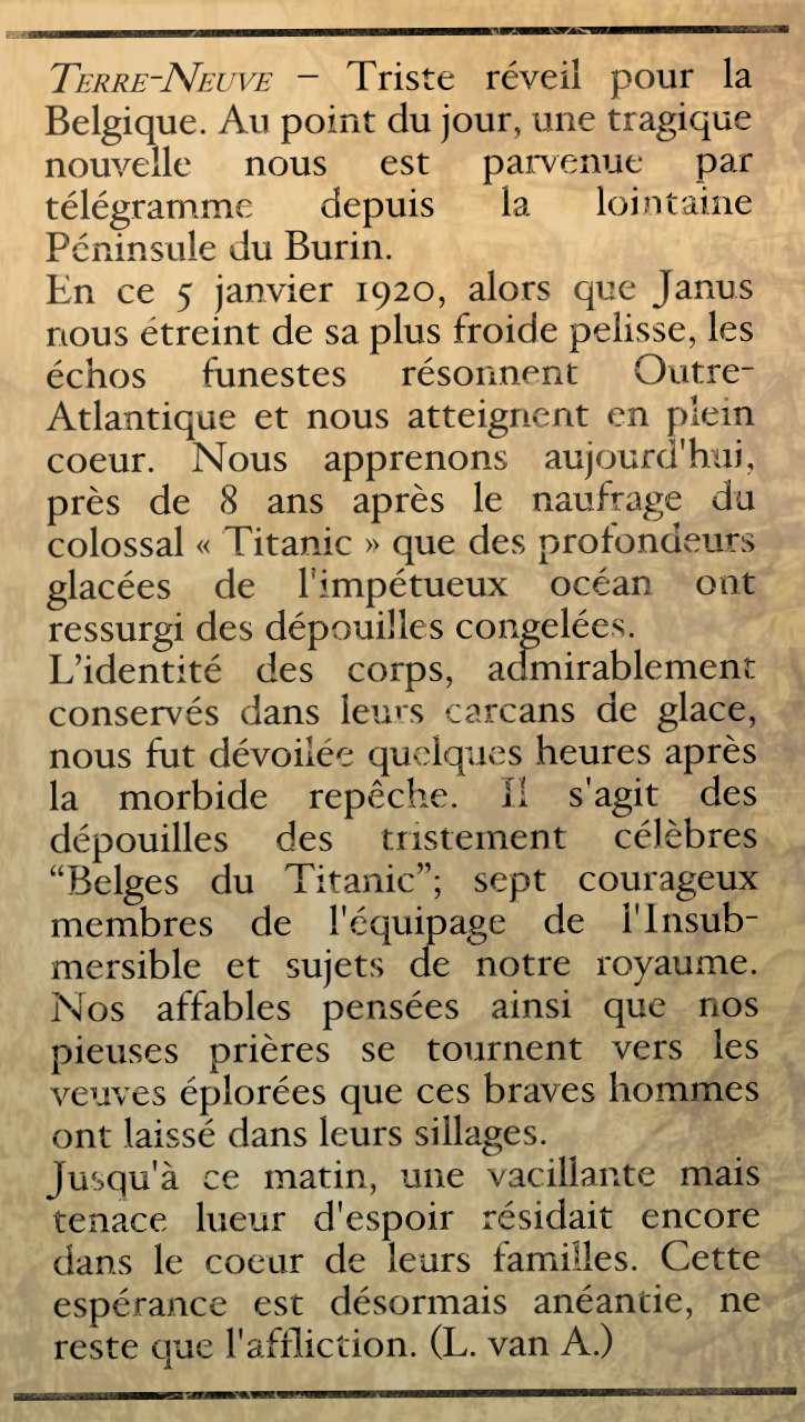 Extrait de presse Gazette d'Ostende 5 janvier 1920